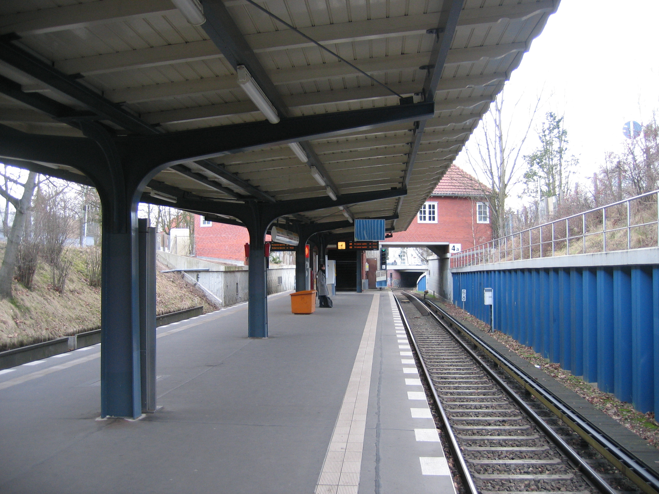 U-Bahnhof Thielplatz, Berlin